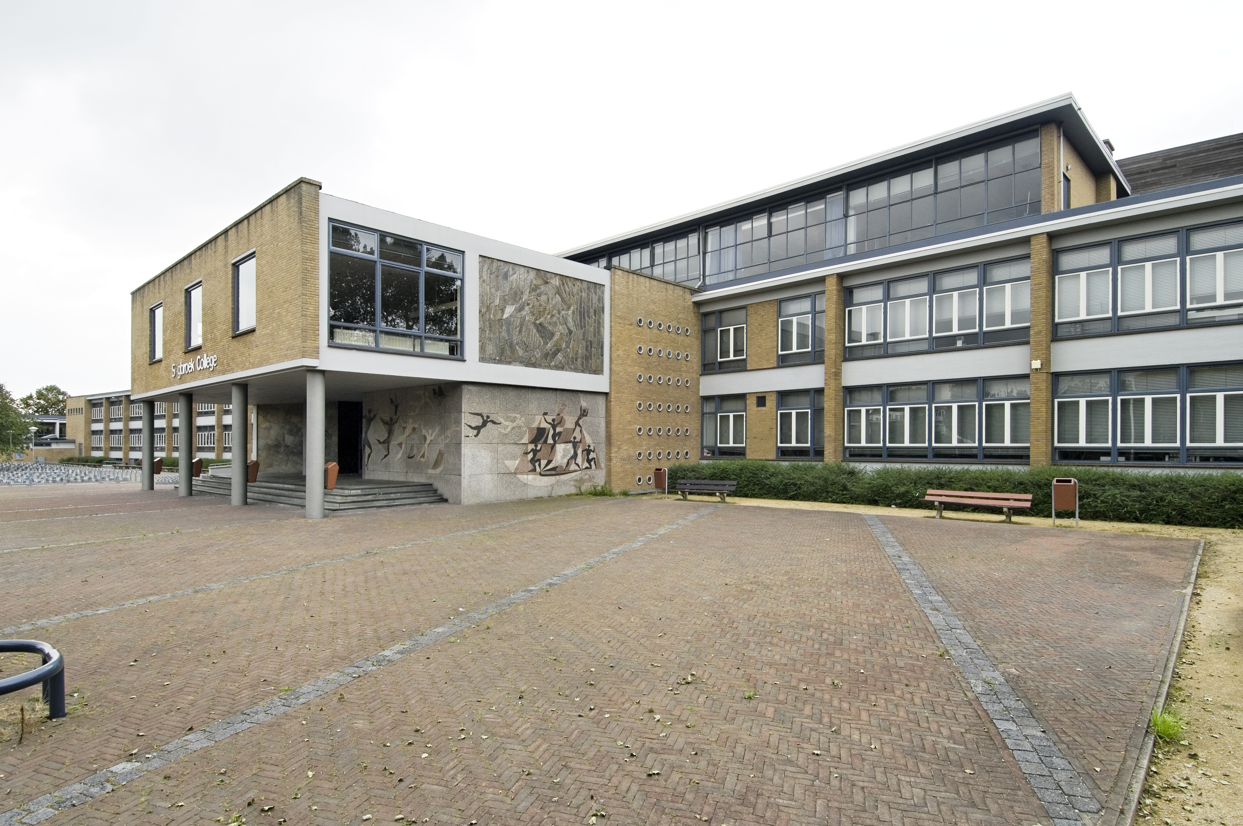 Grotiuslyceum: Overzicht van de voorgevel met zicht op de ingangspartij (opmerking: Gefotografeerd voor Monumenten van Herrezen Nederland)